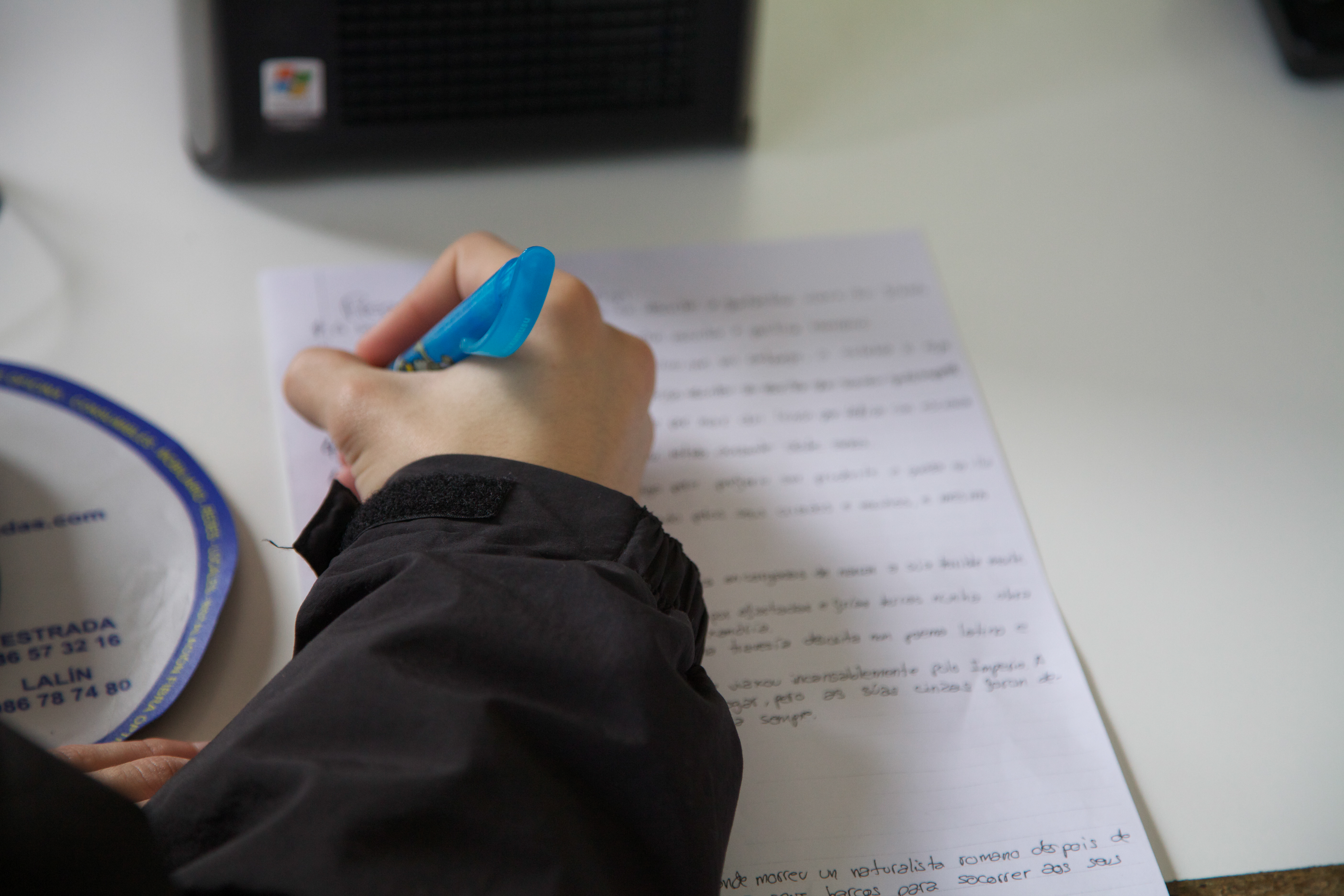 Concurso de Cultura Clásica Odisea. Foto tirada na Biblioteca do IES "Manuel García Barros", A Estrada, Galiza